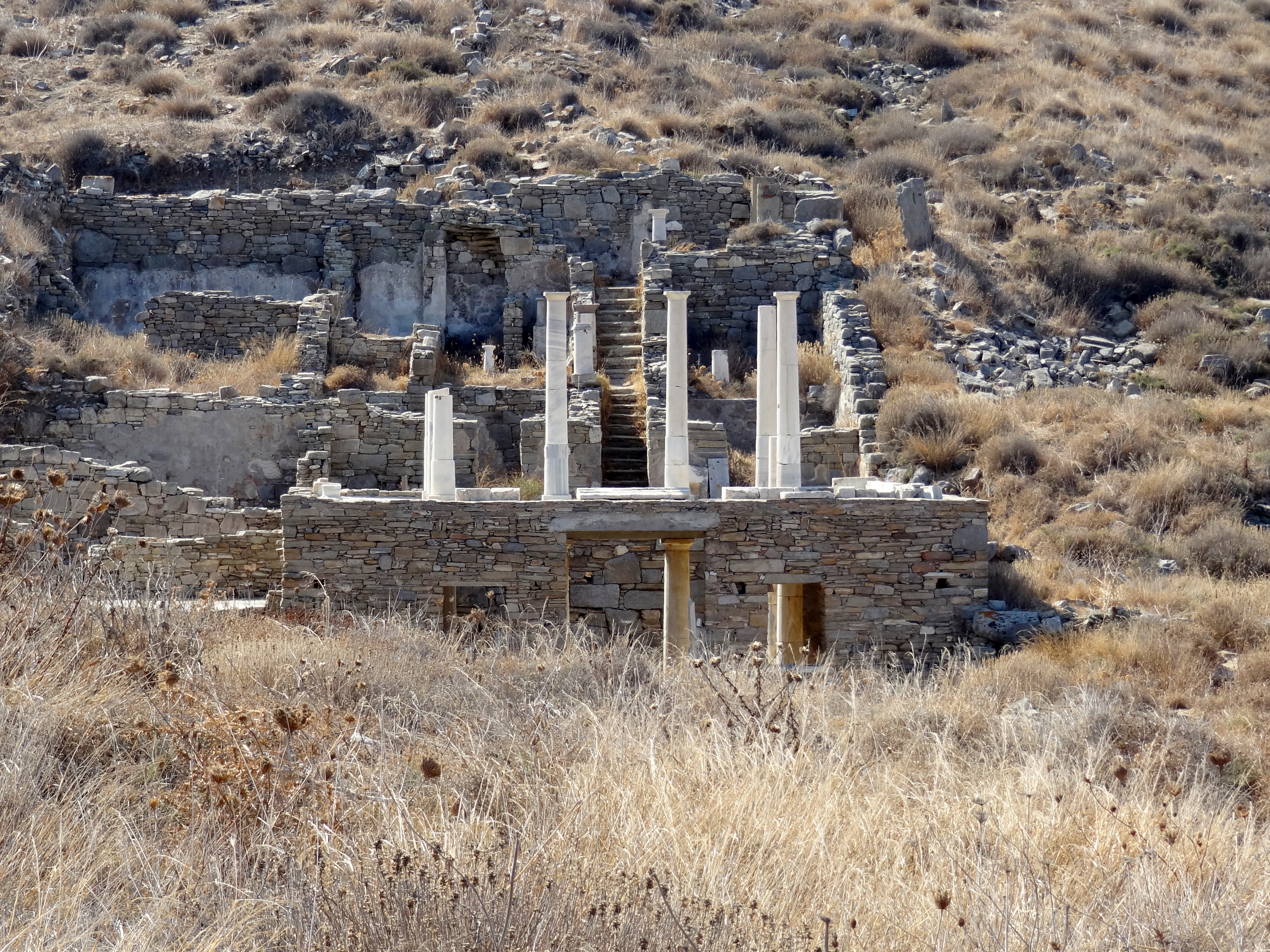 Haus des Hermes in der Ausgrabungsstätte von Delos, Kykladen, Griechenland